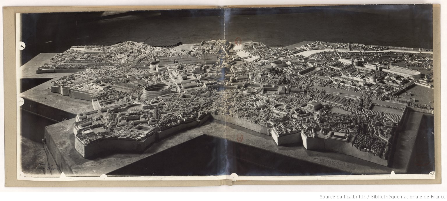 Photo de la Rome impériale au IVe siècle ap. J.-C. par Paul Bigot